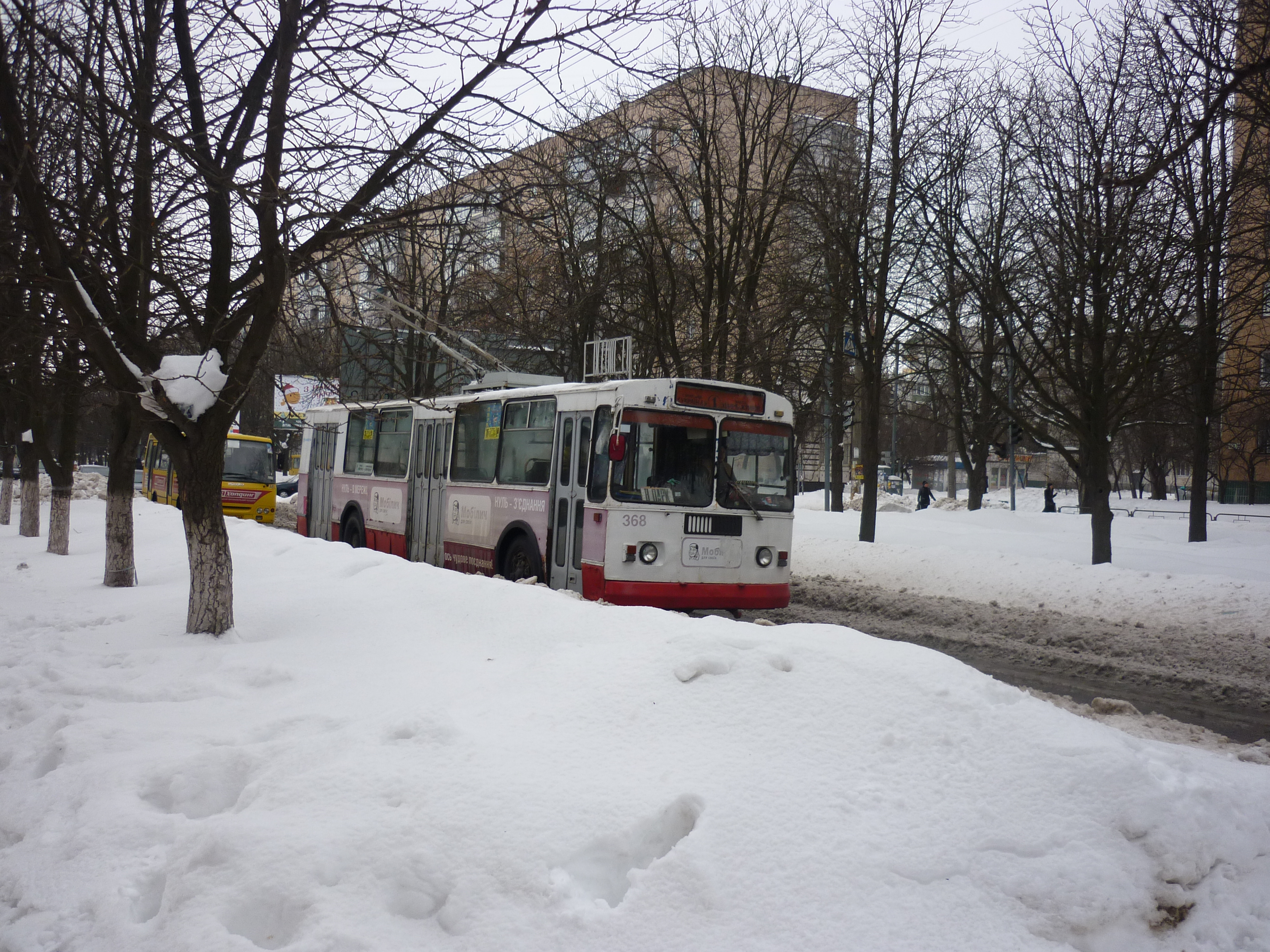 Черкаський тролейбус №368 на маршруті №1